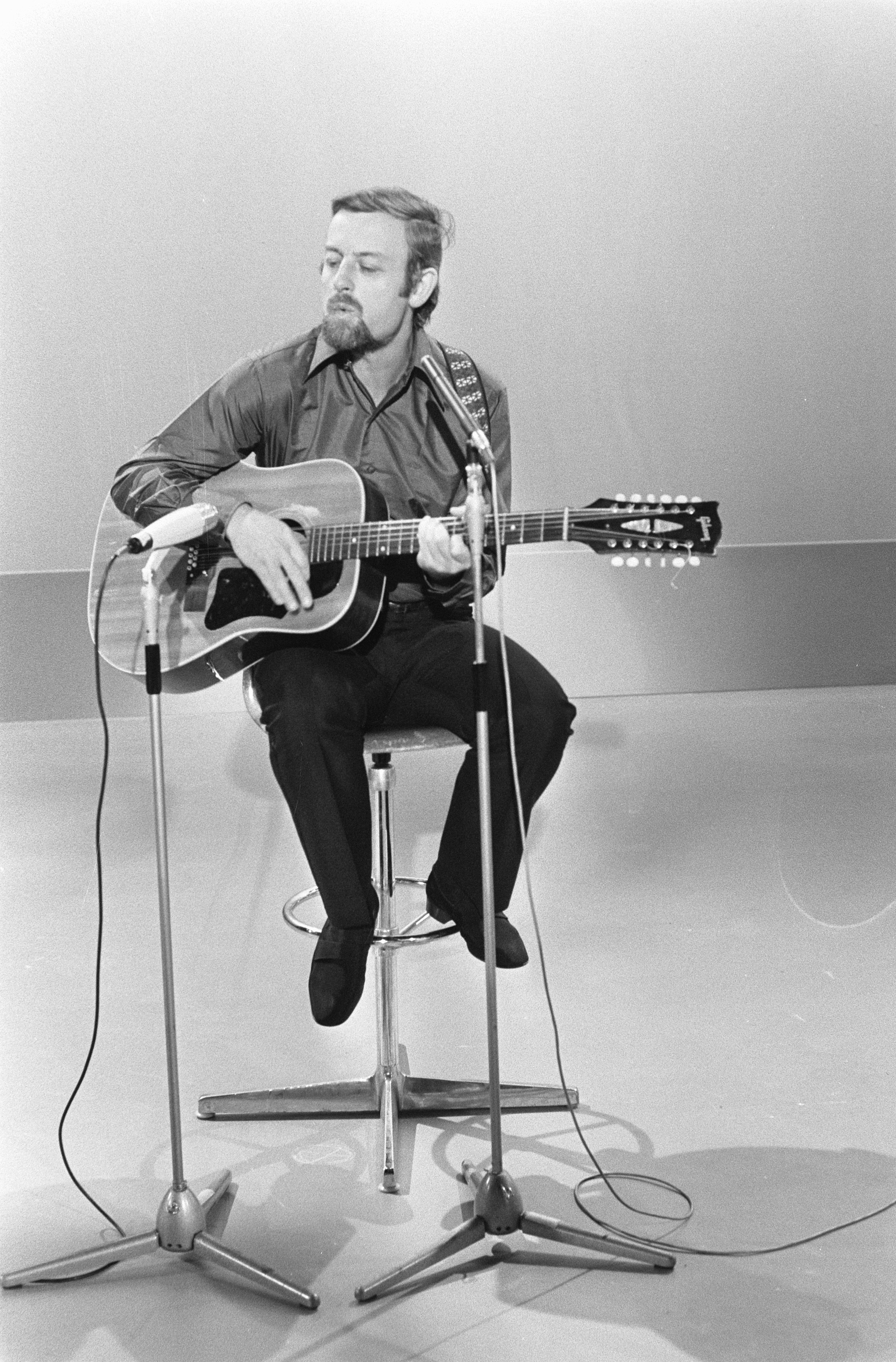 Collectie / Archief : Fotocollectie Anefo Reportage / Serie : [ onbekend ] Beschrijving : Roger Whittaker, TV: Hadimassa Datum : 6 januari 1972 Trefwoorden : gitaren, zangers Persoonsnaam : roger witthaker Fotograaf : Punt, […] / Anefo Auteursrechthebbende : Nationaal Archief Materiaalsoort : Negatief (zwart/wit) Nummer archiefinventaris : bekijk toegang 2.24.01.05 Bestanddeelnummer : 925-2892